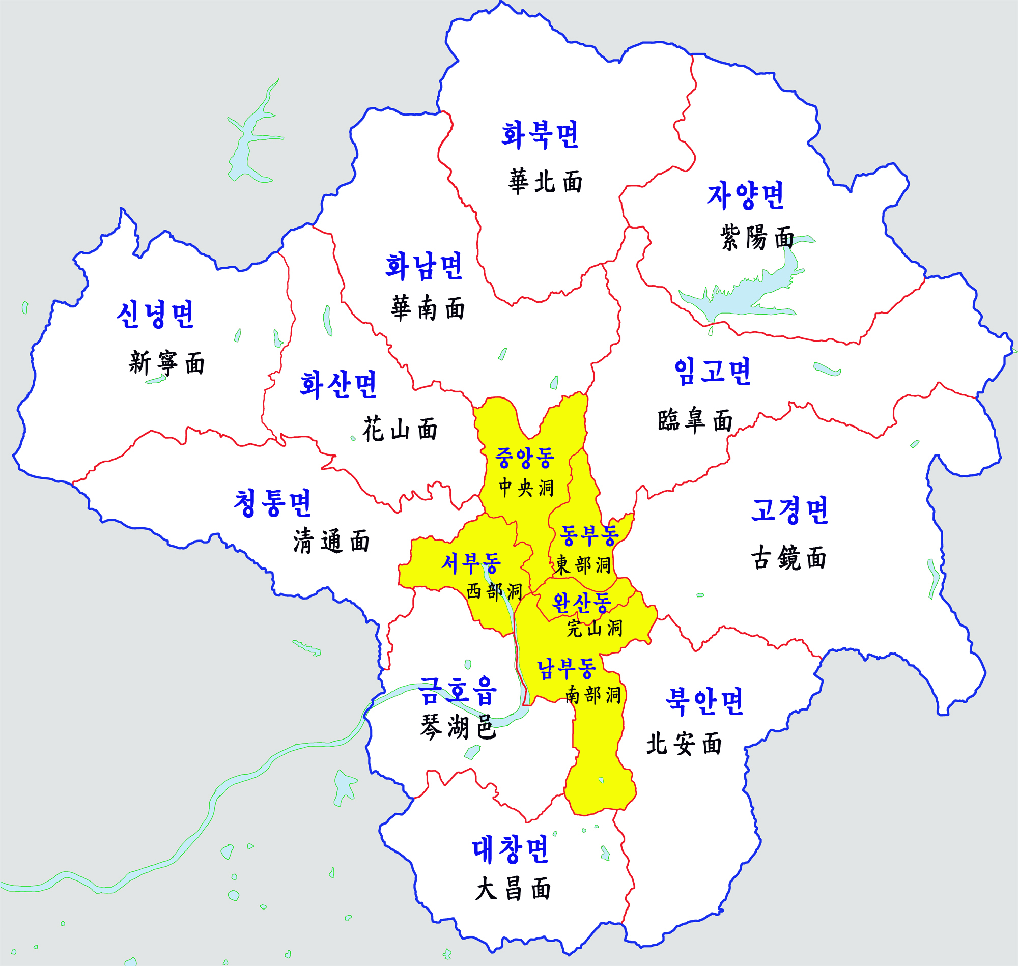 영천시 행정구역